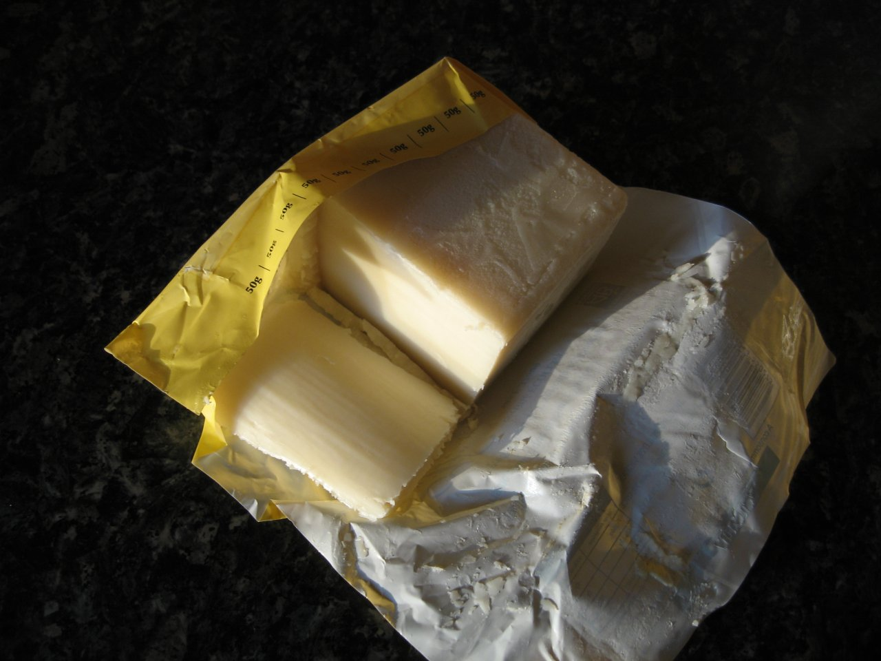 Bloc d'huile de palme biologique